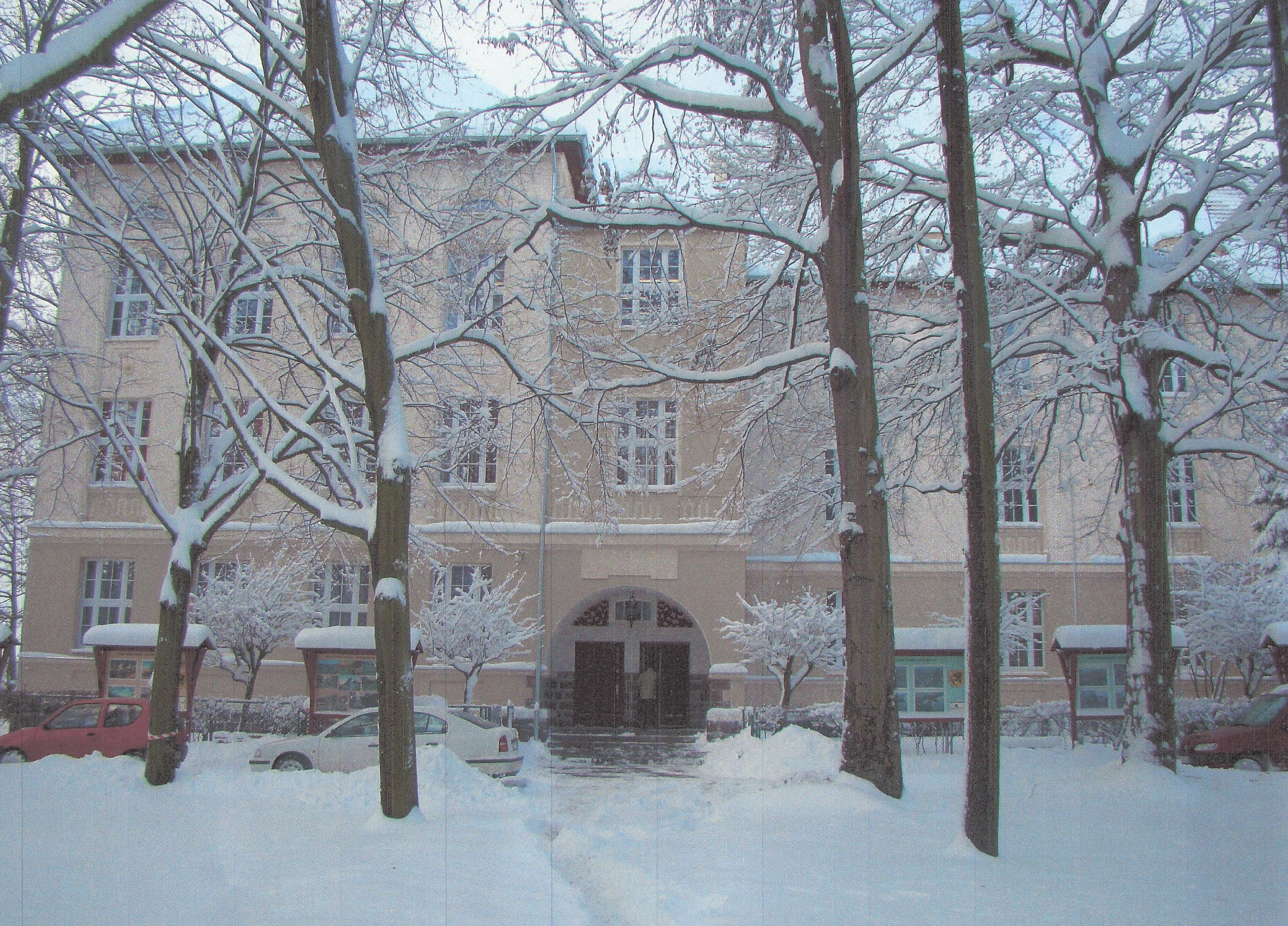 Szczecinek, ul. Księżnej Elżbiety 1 - I Liceum Ogólnokształcące im. Księżnej Elżbiety